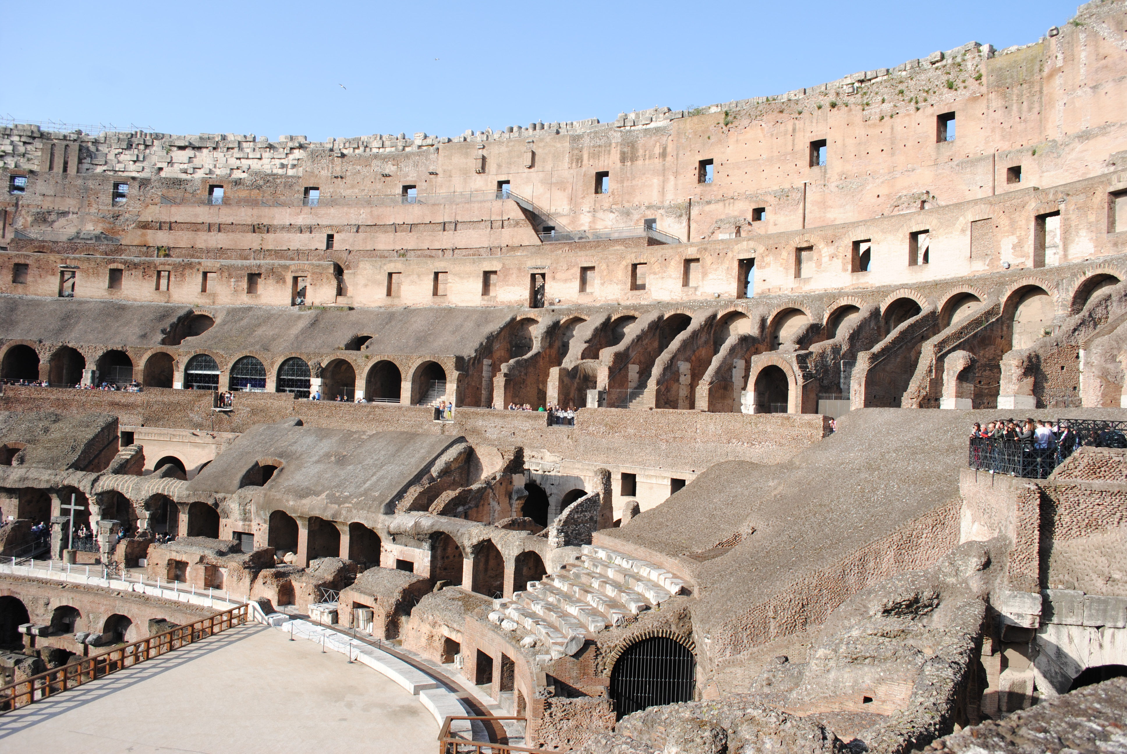 Interno del Colosseo, Roma.